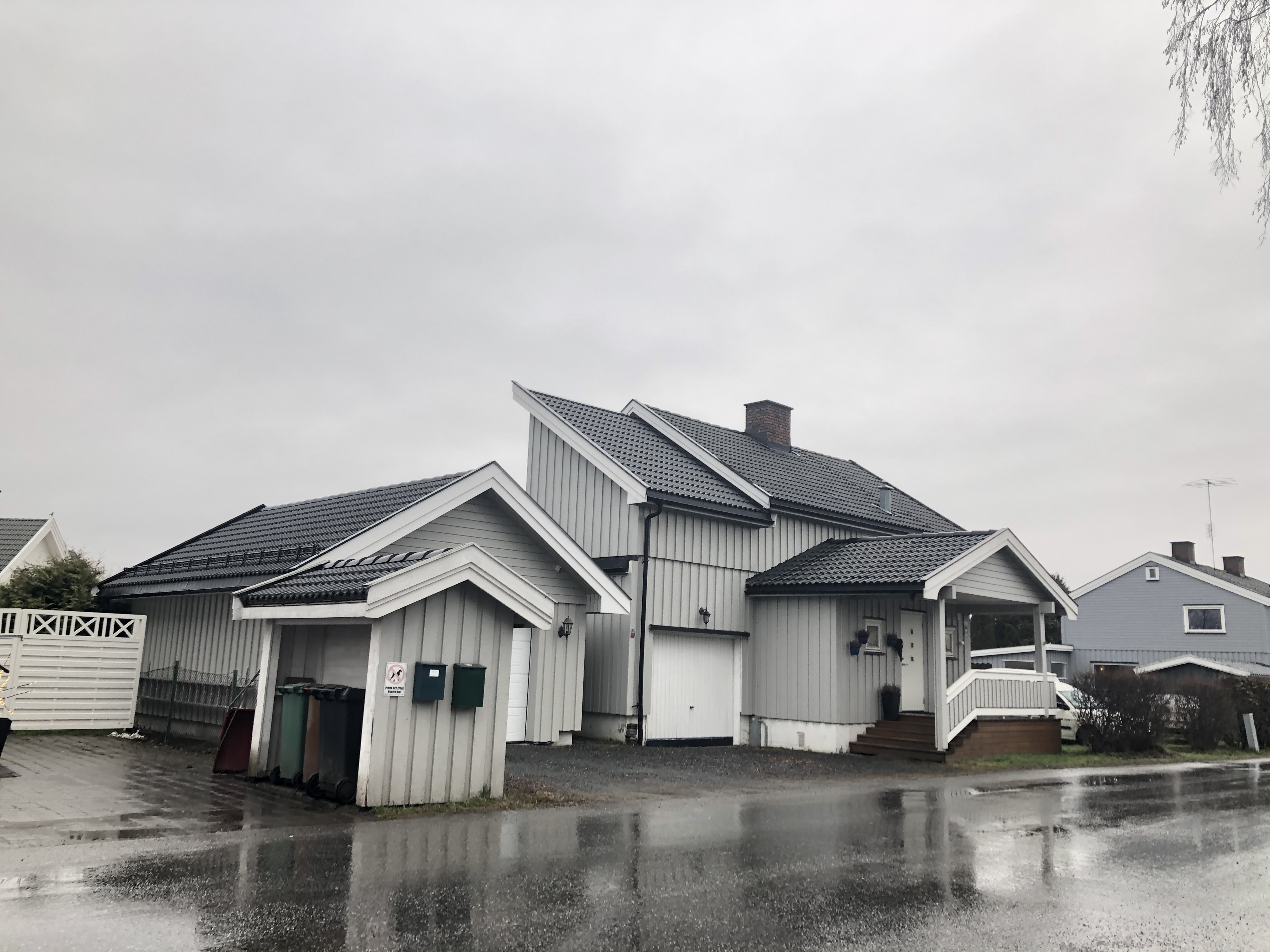 Asbjørnsens gate 13, Hønefoss